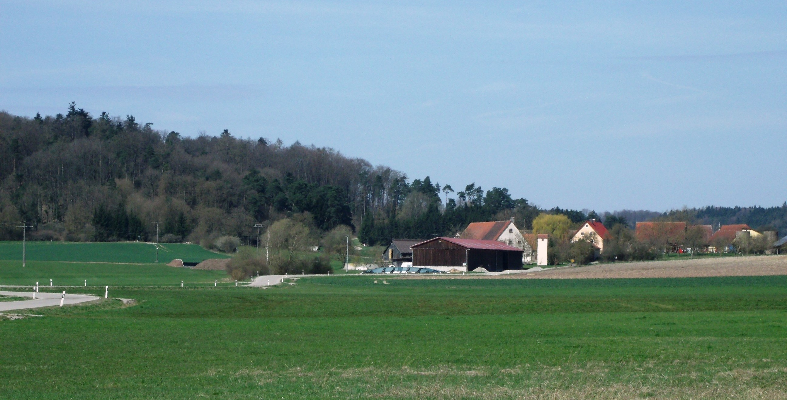 Waizendorf, Ortsteil von Leutershausen im Landkreis Ansbach